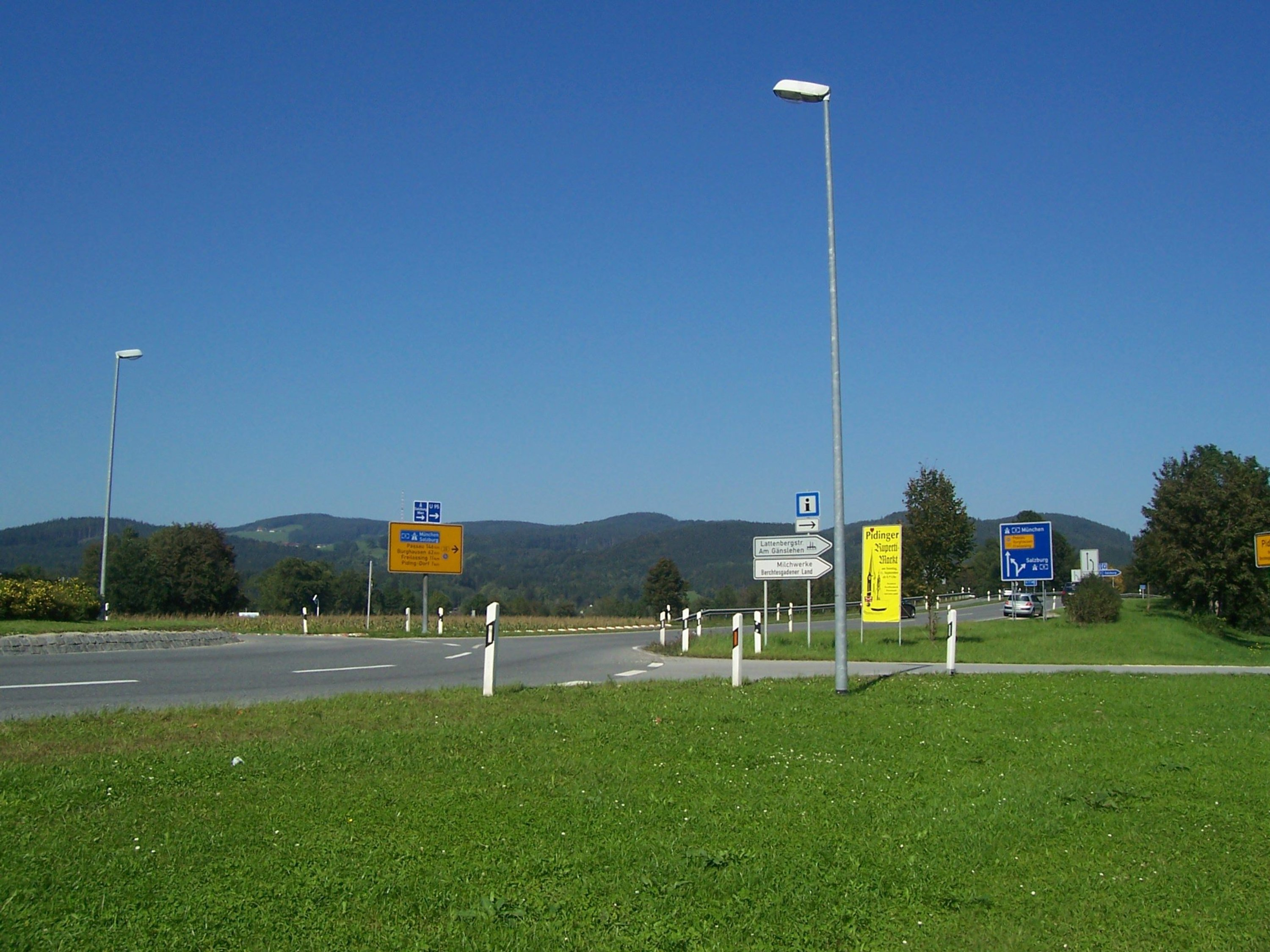 B 20 bei Piding nahe A8 Bei Verwendung bitte ich hier um einen Hinweis, wo das Foto genutzt wird.